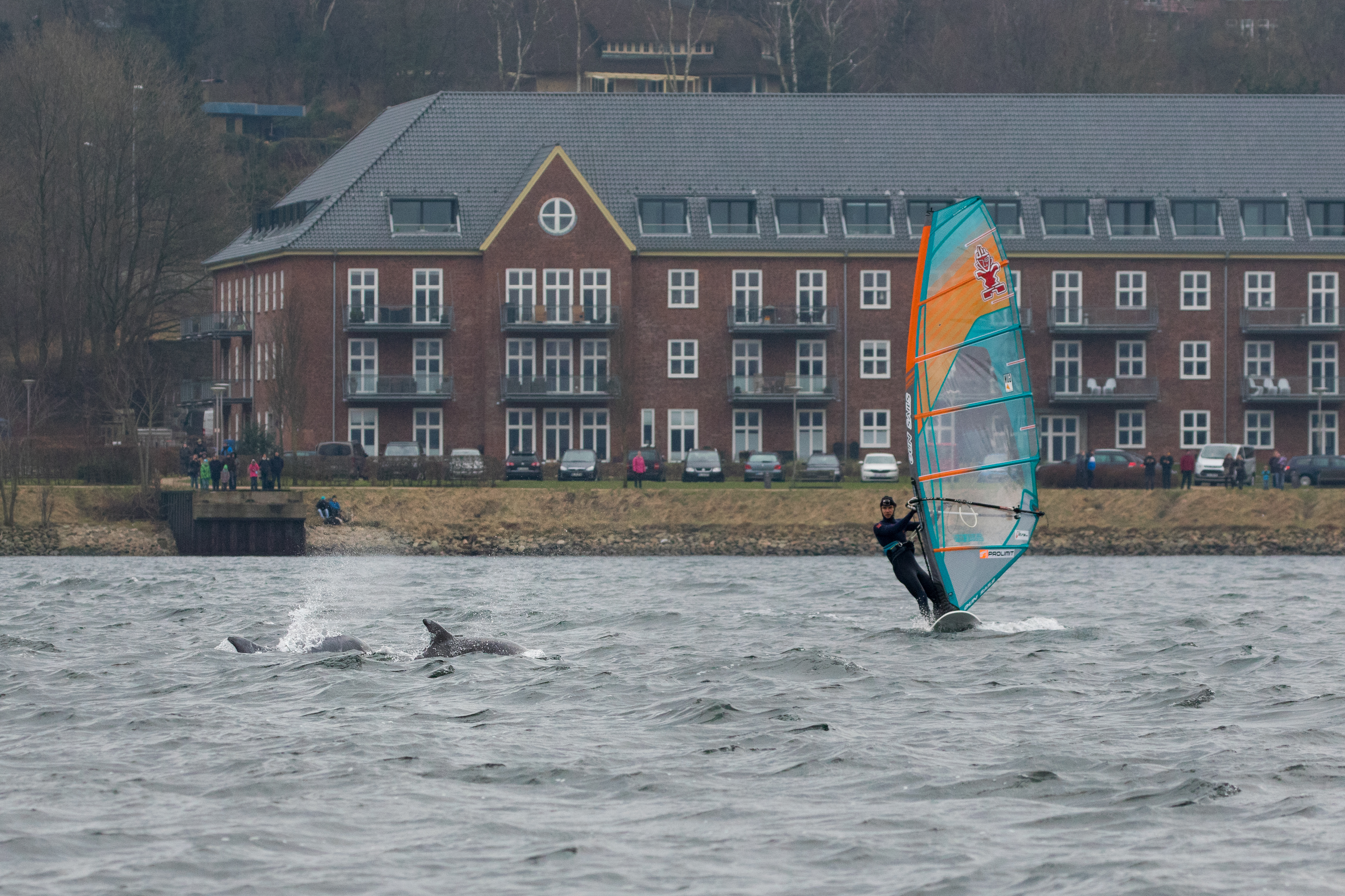 Surfer Valentin Böckler surft mit Delfinen in Flensburg